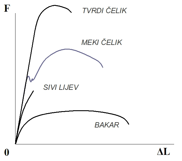 Dijagrami čvrstoće čestih tehničkih materijala